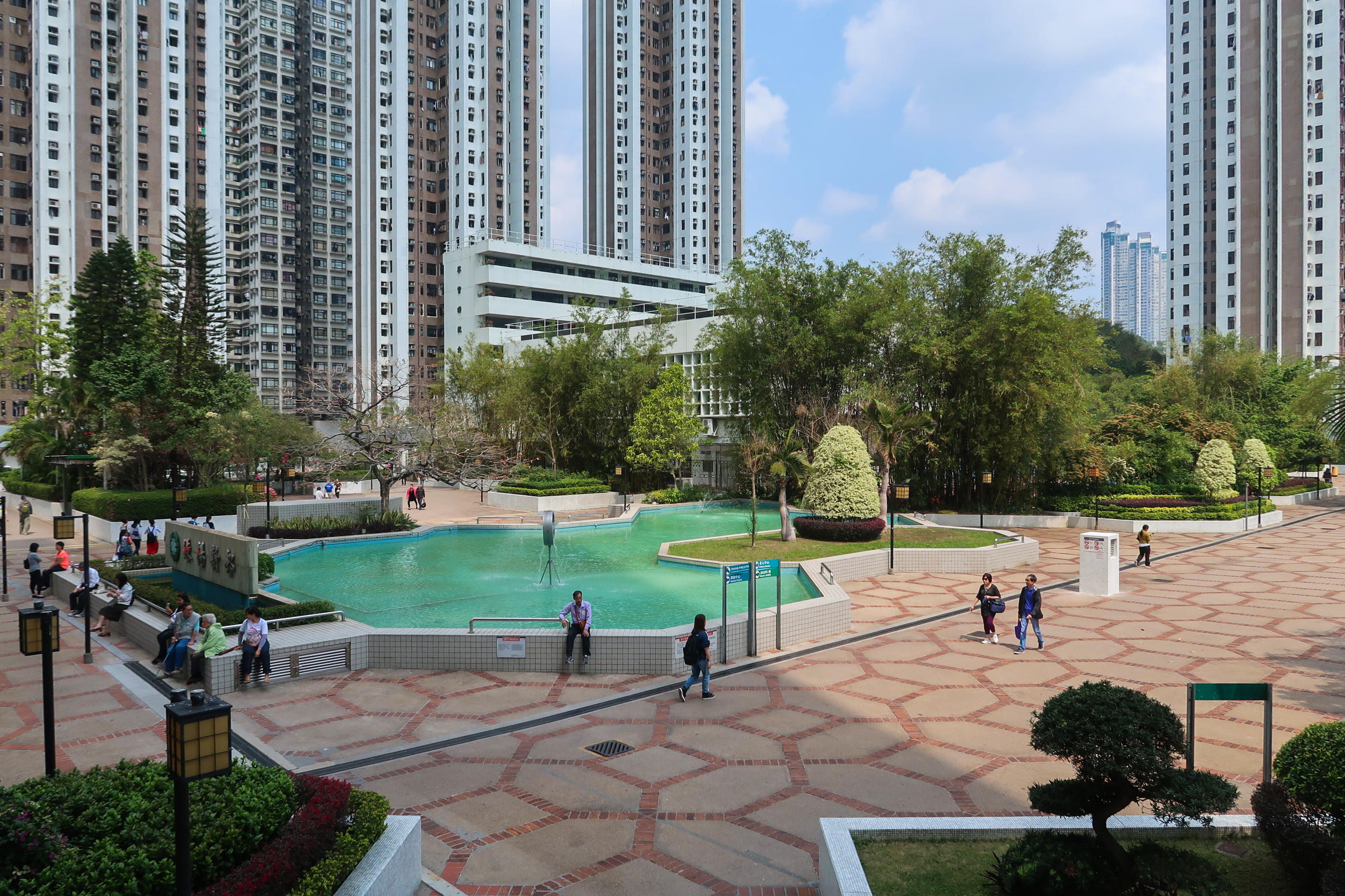 Luk Yeung Sun Chuen Podium